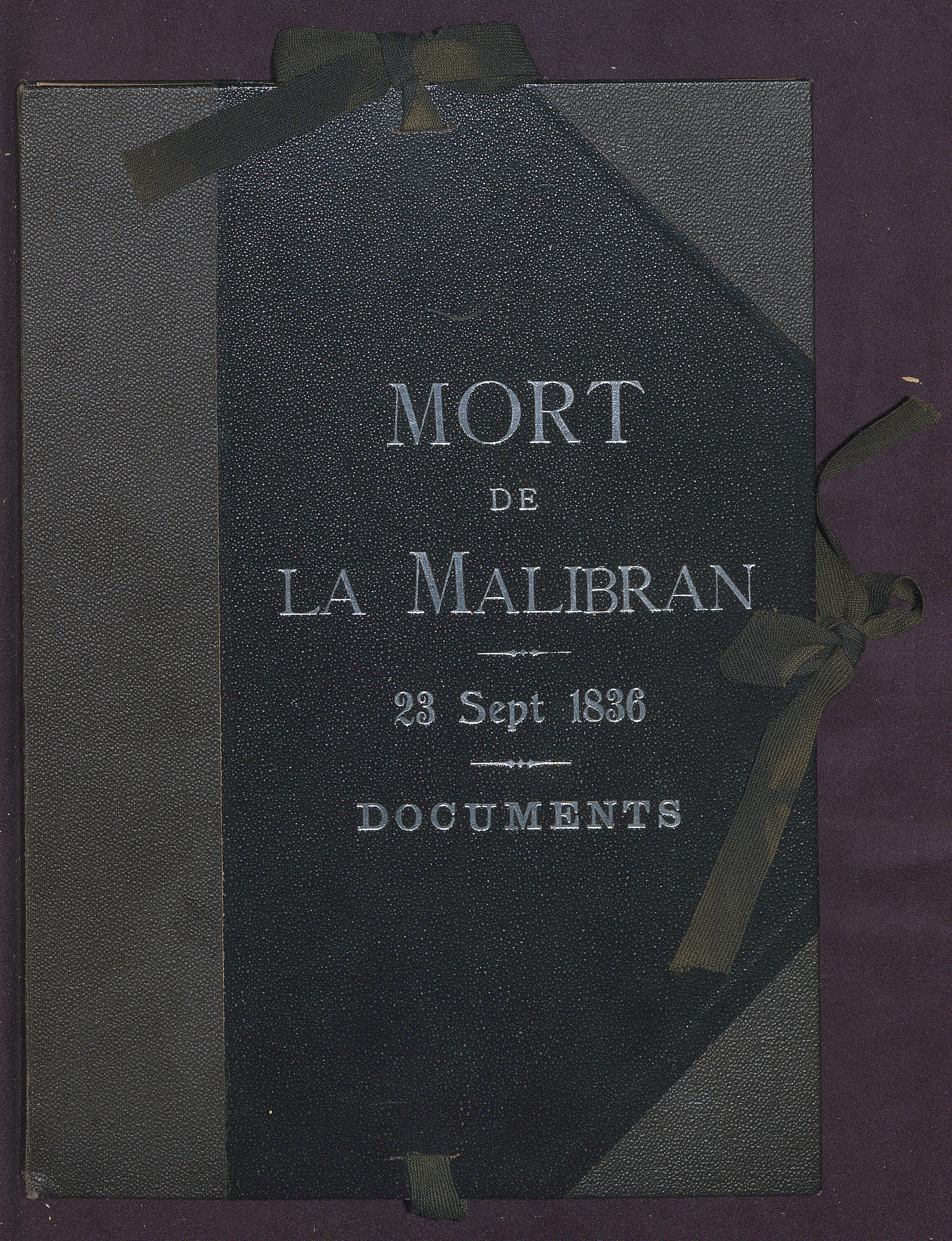 Chemise cartonnée "Mort de la Malibran" contenant, e.a., l'acte de décès et le rapport funéraire de la Malibran (Bibliothèque du Conservatoire royal de Bruxelles, B-BC FC-02-MM-006/1)